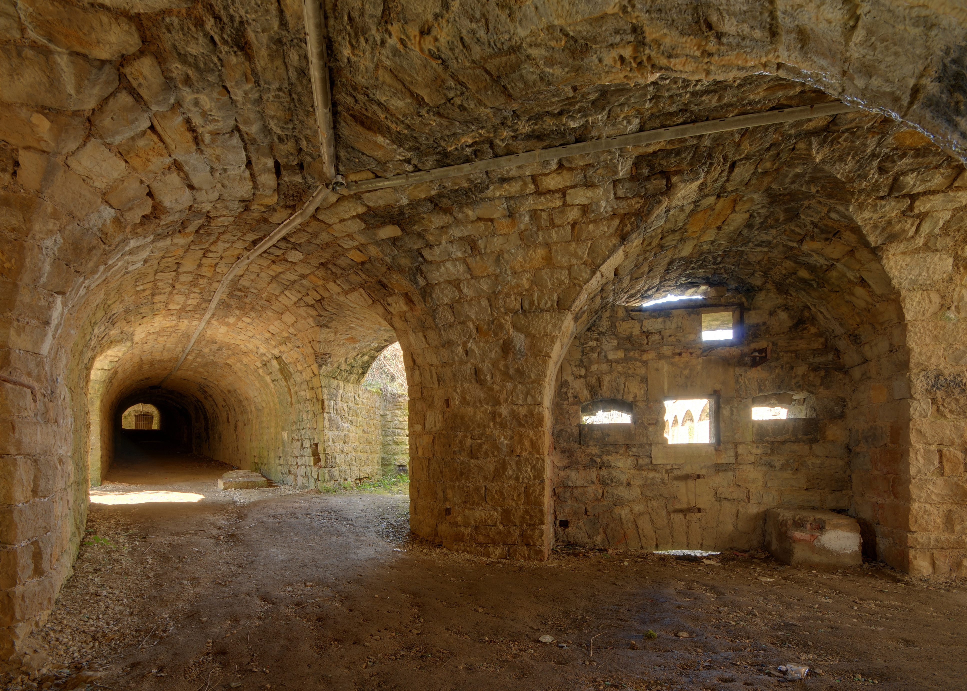 This photograph was taken with a Nikon D300 Dans la caponnière double de l'enveloppe, à l'Est du fort. Lachaux fortifications (HDR).